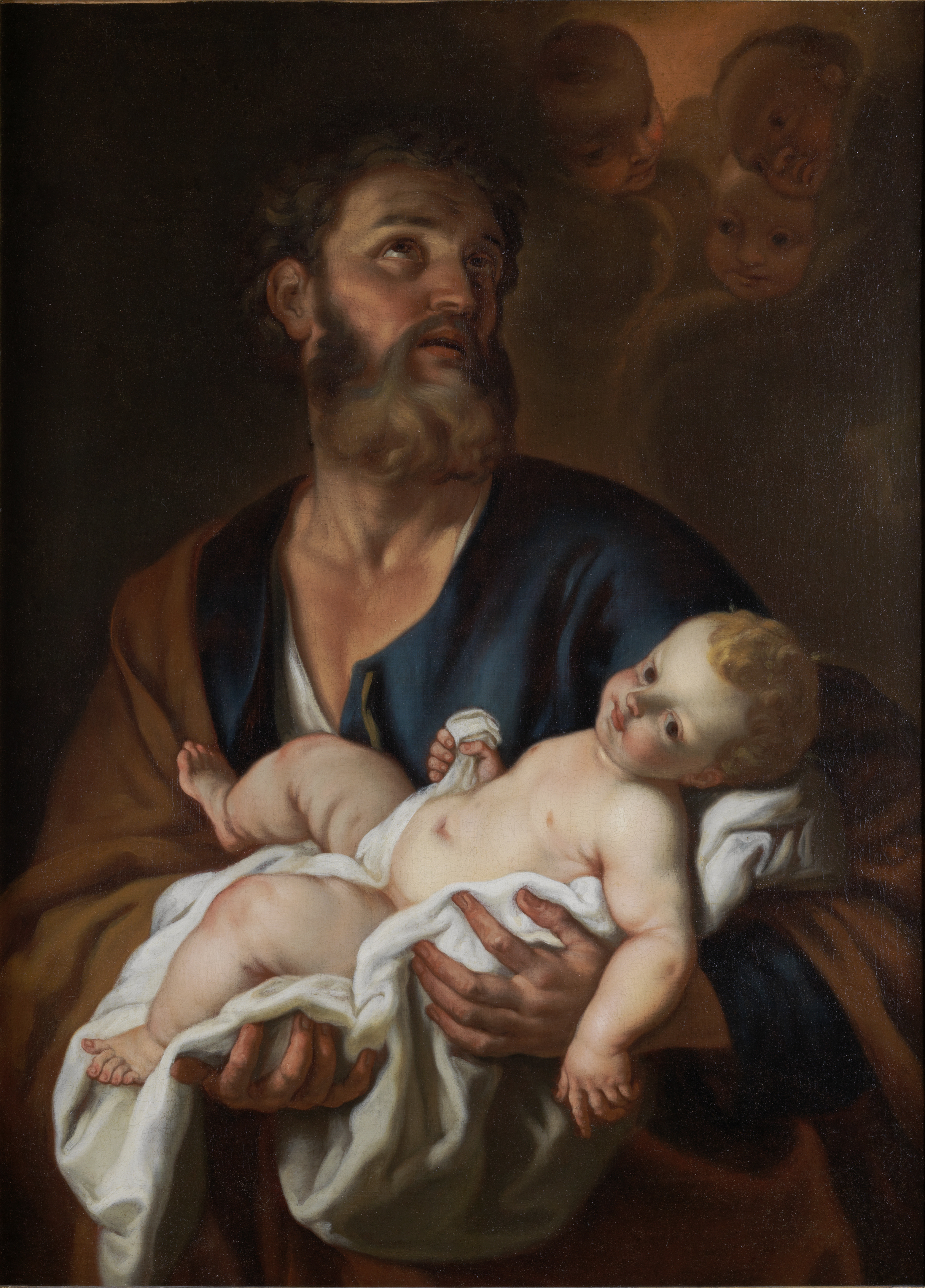 schilderij ( Jacob Leyssens ( Museum Plantin-Moretus